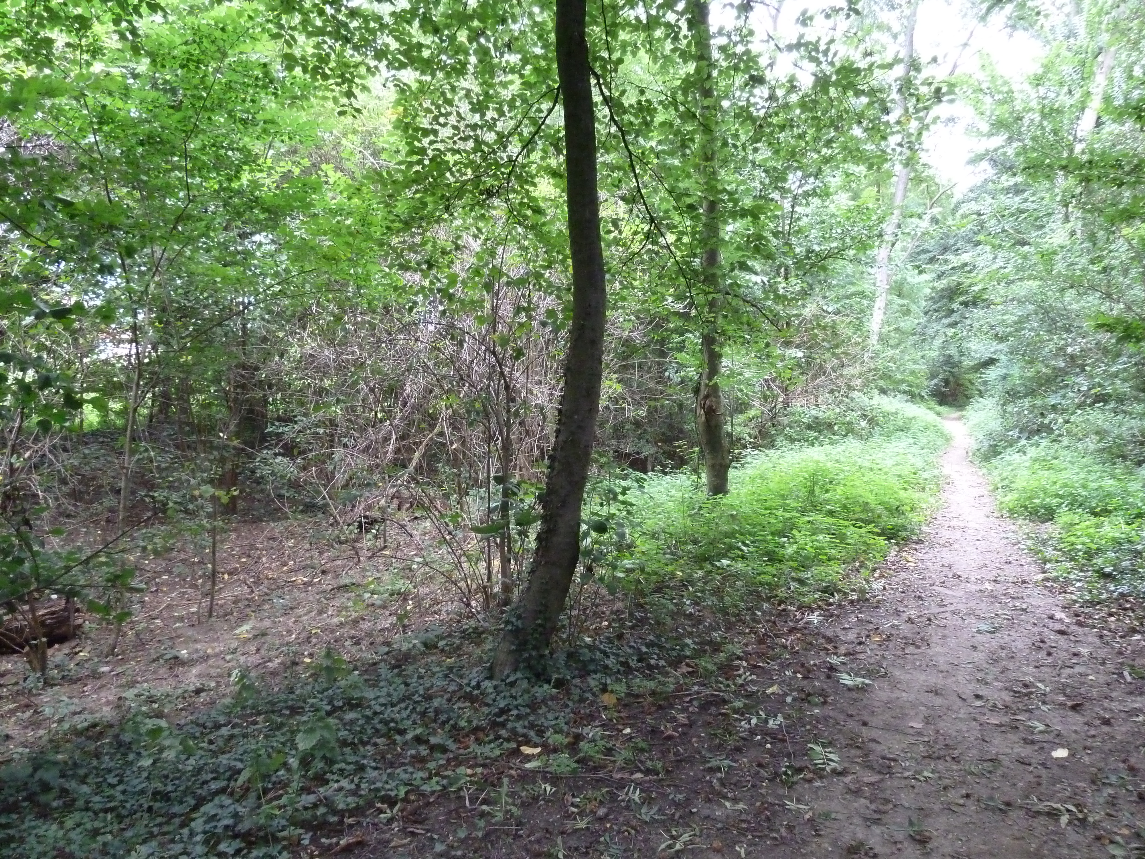 De Wallen van Stein, een landweer, Stein, Limburg, Nederland